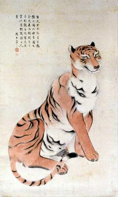 文久三年の川端玉章による虎の写生